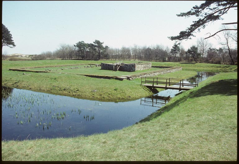 Falsterbo 5:1. Borgruin bestående av byggnadsruin, borggård samt inre och yttre vallgrav med mellanliggande vall. Motiv: Falsterbo 5:1 Kategori: Borg Falsterbo 5:1. Borgruin bestående av byggnadsruin, borggård samt inre och yttre vallgrav med mellanliggande vall. Falsterbo 5:1.